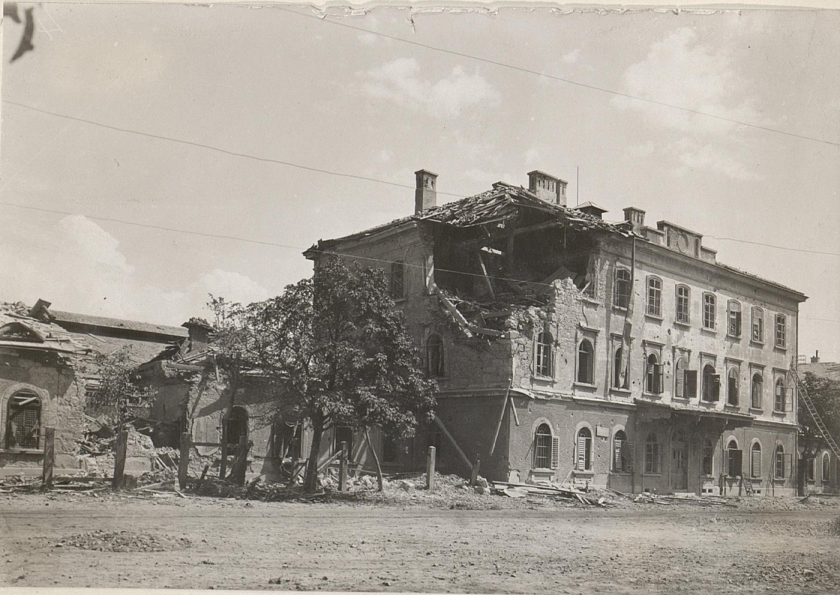 Wirkung eines Volltreffers am Bahnhofvon Nabresina.25.8.17.